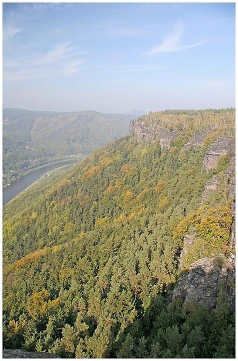 Pohled z Růžové vyhlídky autor: Prazak date: October 2006